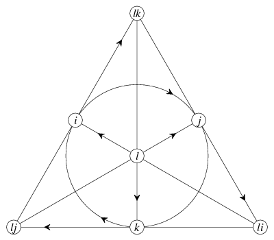 Plan mnémotechnique de Fano